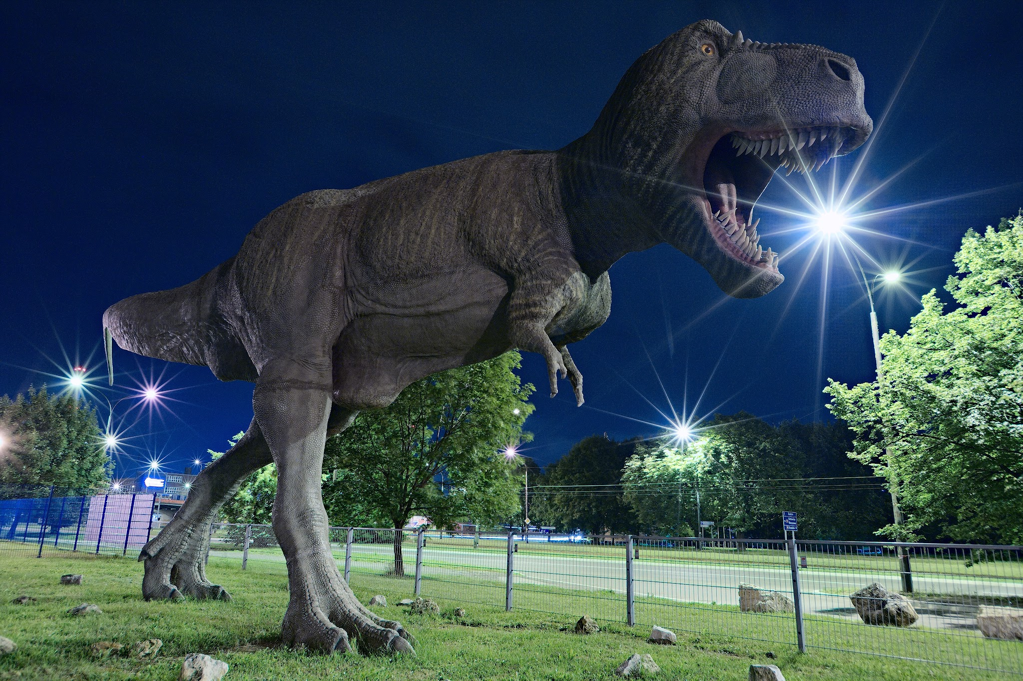 Dinozaur przy wydziale nauk o ziemi uniwersytetu śląskiego w sosnowcu